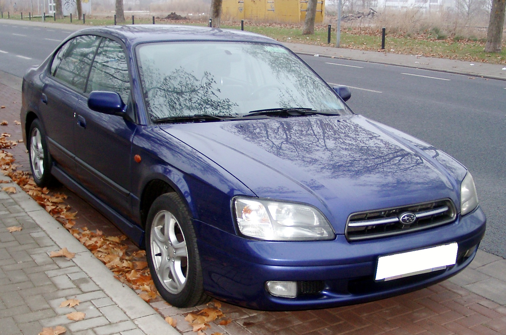 Subaru Legacy